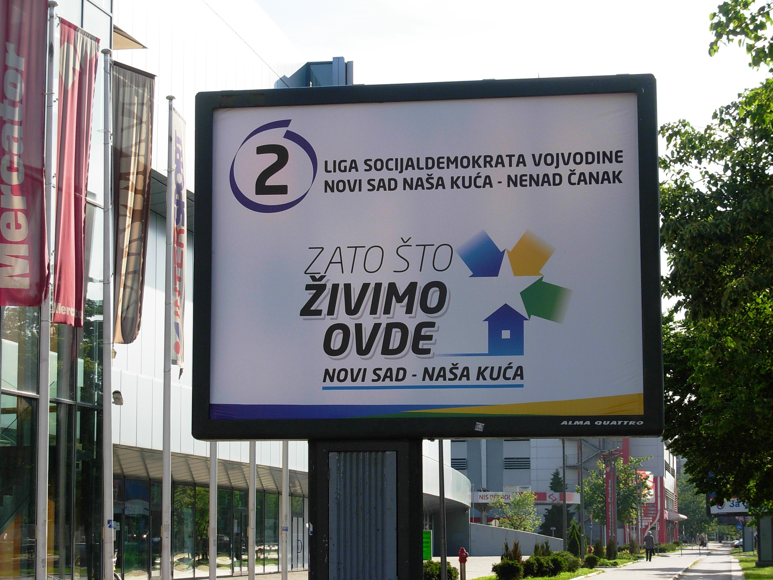 Bilbord - Liga socijaldemokrata Vojvodine, u Novom Sadu.